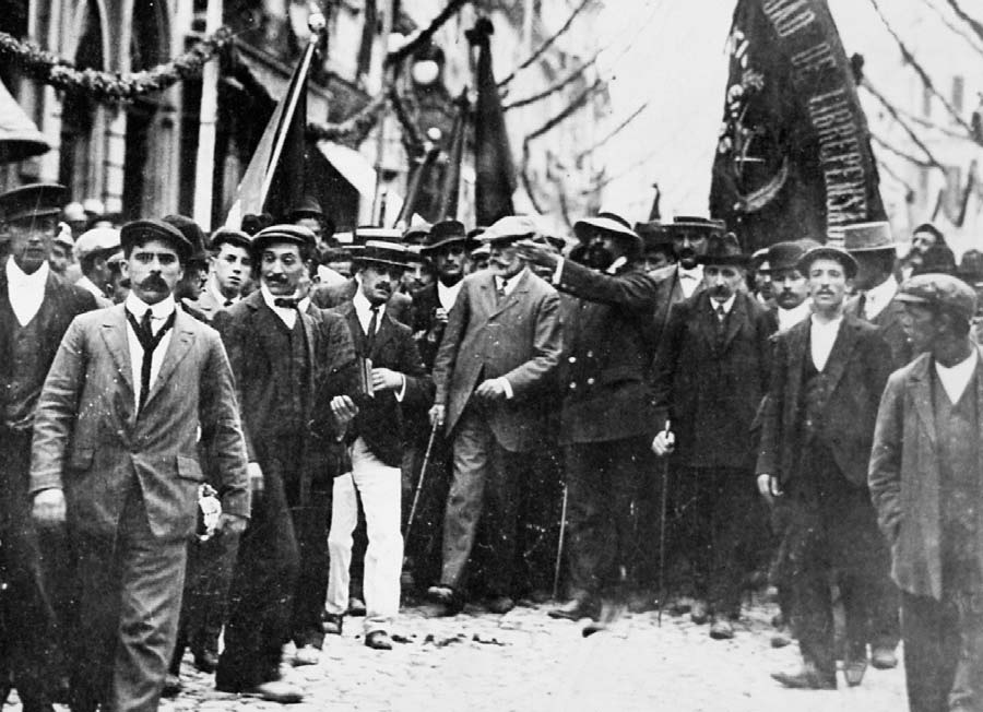 Pablo Iglesias Posse (1850-1925) e Enrique Heraclio Botana (1871-1936) en Vigo, nunha visita do fundador do PSOE e a UGT.